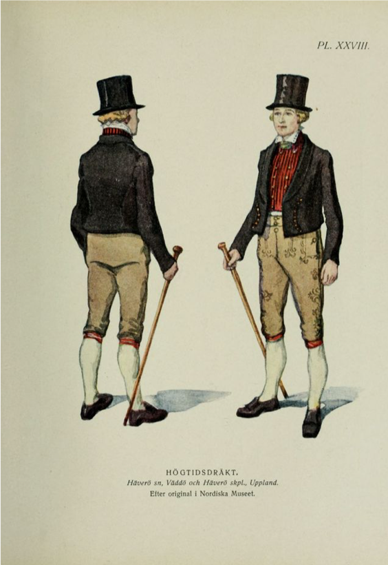 Man iförd Häverö mandräkt (högtidsklädsel).